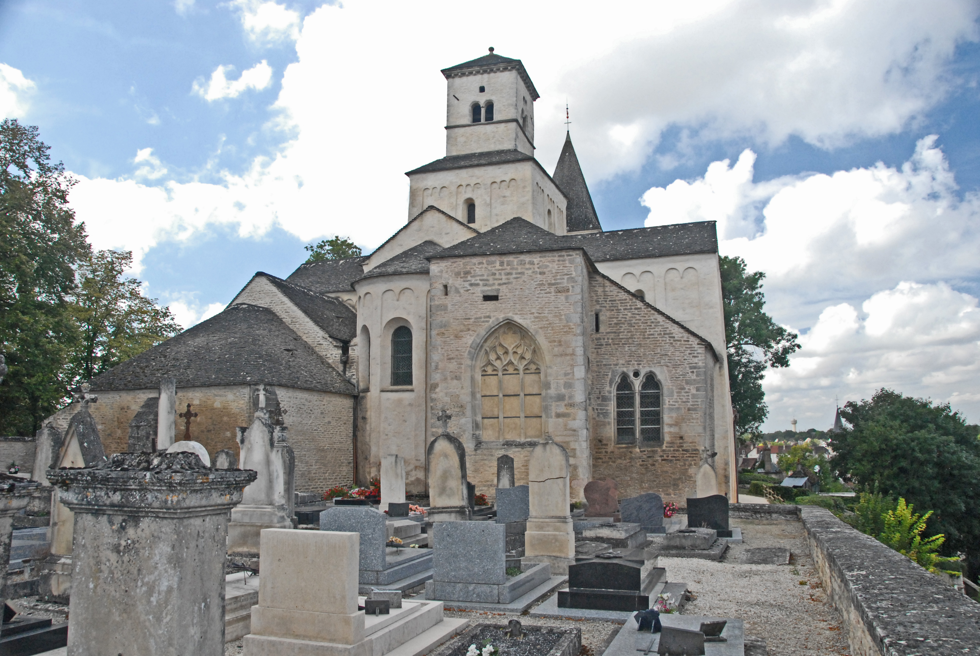 St-Vorles de Châtillon-sur-Seine, Chorhaupt von N